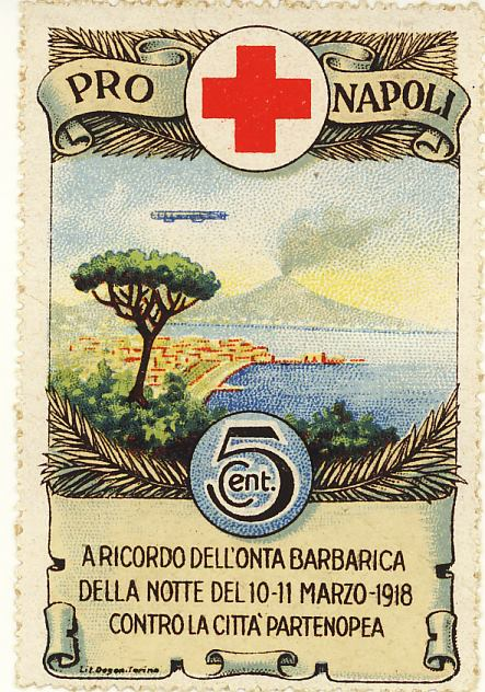 chiudilettera della Croce Rossa Italiana a ricordo del bombardamento su Napoli ad opera un dirigibile della Marina tedesca L59, partito da Plovdiv, attuale Filippopoli nella notte del 10-11 marzo del 1918 quando in Bulgaria, sfruttando il buio della notte sganciò bombe sulla zona dei Granili, dove si contarono cinque morti e 40 feriti, poi su Posillipo, dove pure si contarono 11 morti e 35 feriti, ed in ultimo sugli stabilimenti industriali ILVA, a Bagnoli.